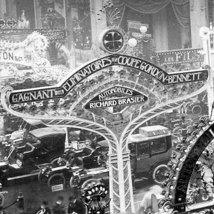 [Collection Jules Beau. Photographie sportive] : T. 31. Années 1905 et 1906 / Jules Beau : F. 16. [8e Salon de l'automobile, du cycle et des sports, 8 décembre 1905]